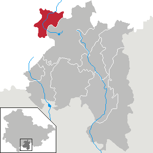 Goldisthal in Thüringen, Landkreis Sonneberg